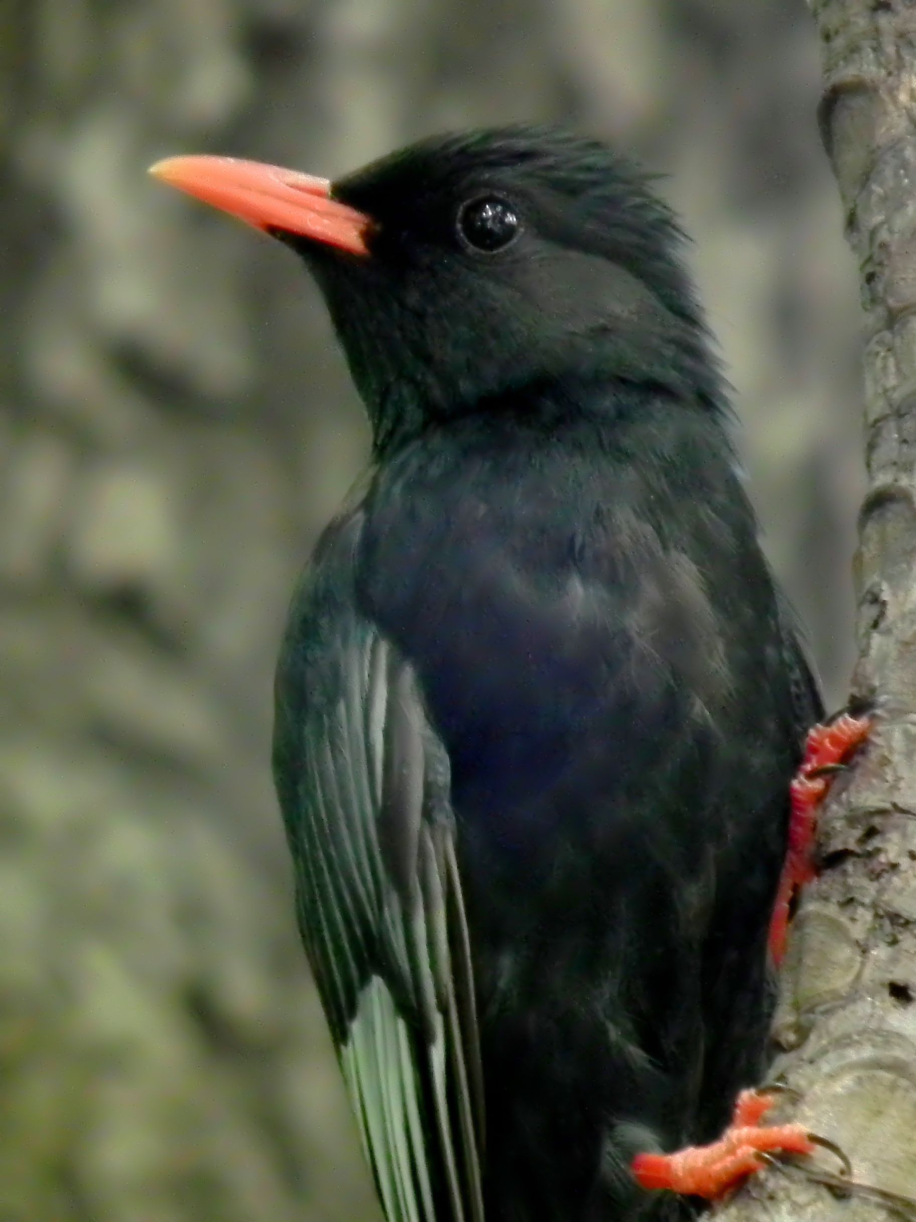 Saw at park of Taiwan